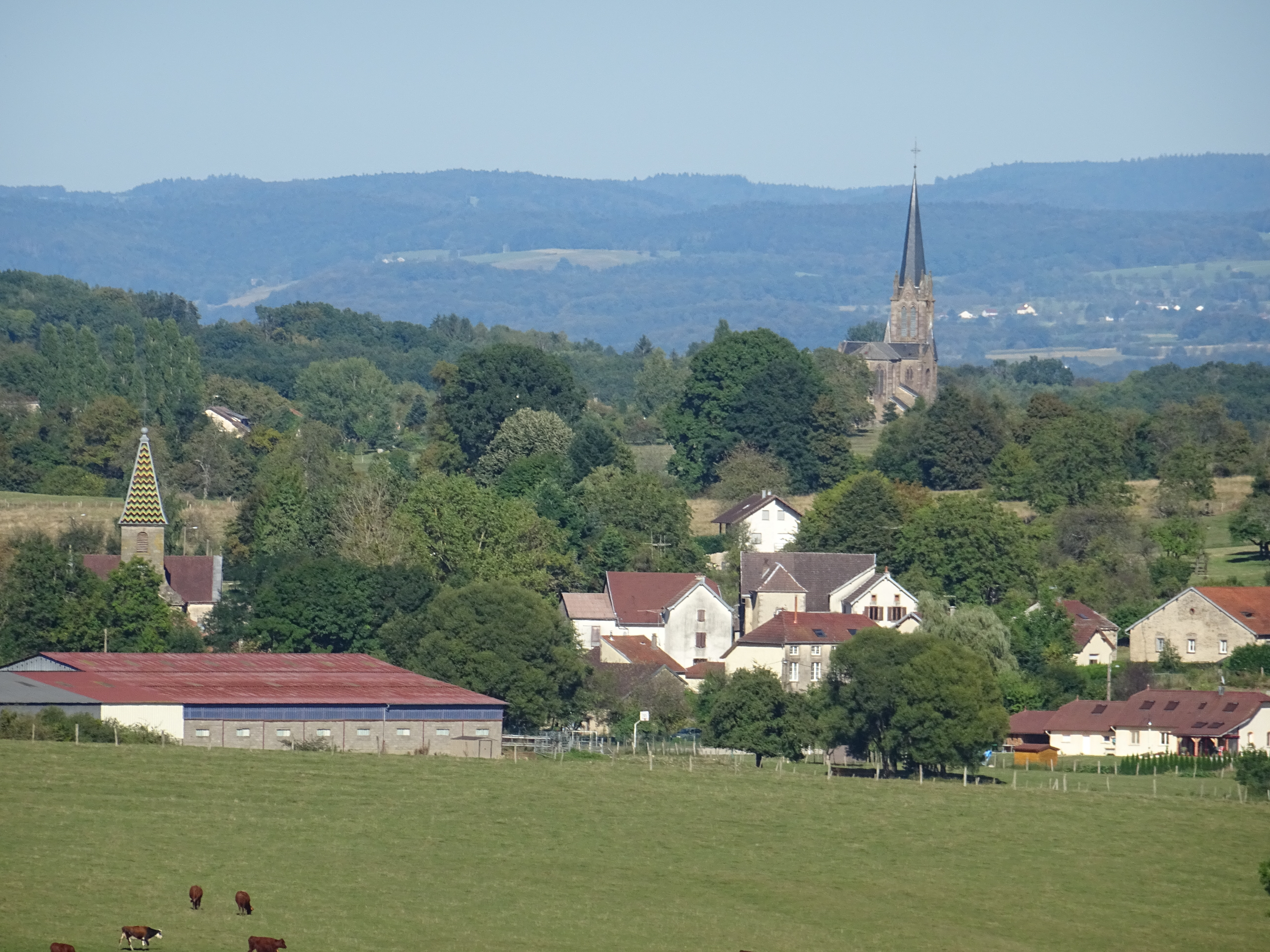 Les clochers de Francalmont et Hautevelle.